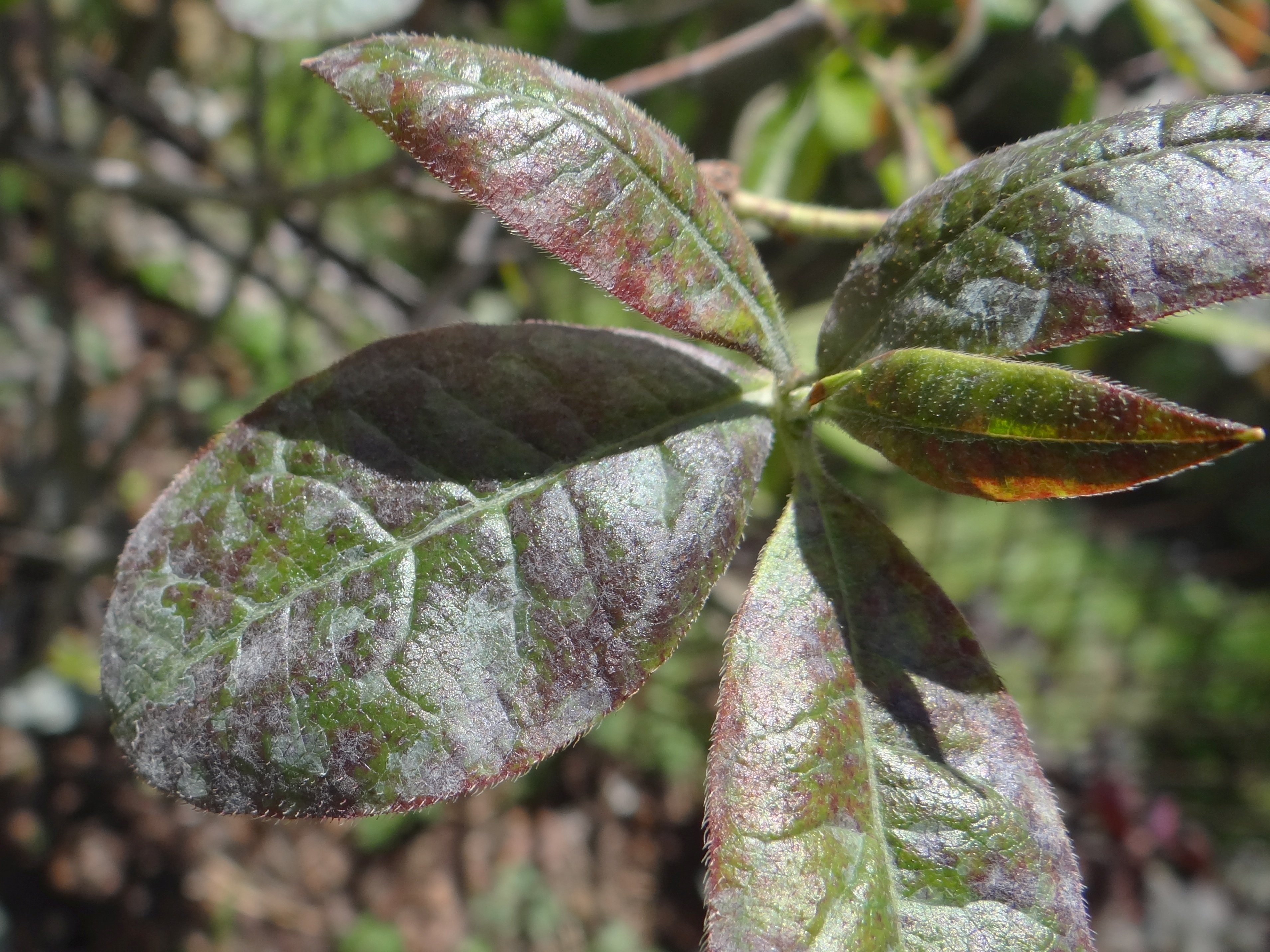 Erysiphe azaleae on Rhododendron sp.